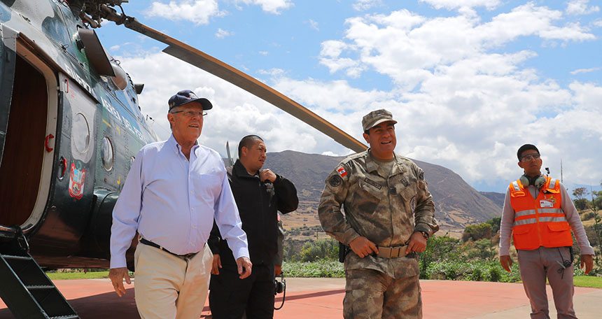 JEFE DE ESTADO SUPERVISARÁ ZONA DONDE SE CONSTRUIRÁ TELEFÉRICO DE PARQUE ARQUEOLÓGICO CHOQUEQUIRAO EN CUSCO.